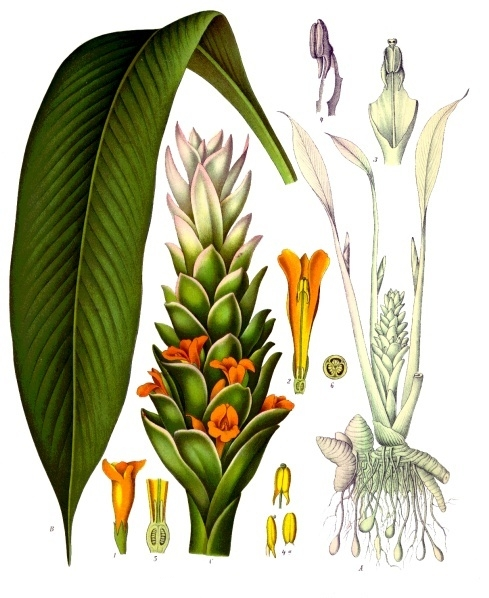 Kurkuma. A Pflanze, verkleinert; B Blatt, nat. Grösse; C Blüthenähre, desgl.; 1 Blüthe, etwas vergrössert; 2 dieselbe im Längsschnitt, desgl.; 3 inneres Perigon der C. aromatica von den Lappen und Staminodien befreit, mit dem fruchtbaren Staubgefäss, vergrössert; 4 Staubgefäss derselben Pflanze, von der Seite, desgl.; 4a Staubbeutel der C. longa von verschiedenen Seiten, desgl.; 5 Fruchtknoten im Längsschnitt mit den unfruchtbaren untersten Staubgefässen (Staminodien), desgl.; 6 Fruchtknoten im Querschnitt, desgl.